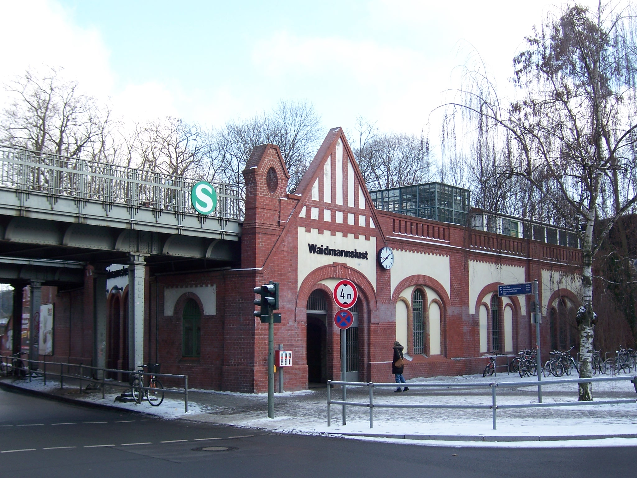 Bahnhof Berlin-Waidmannslust, Bahnhofsgebäude und Brücke